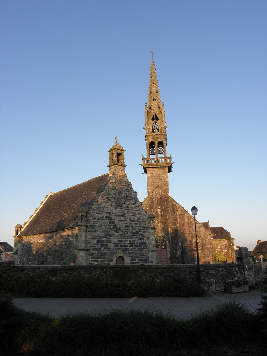 Vue occidentale de l'église et de l'ossuaire de Ploudiry (29). .